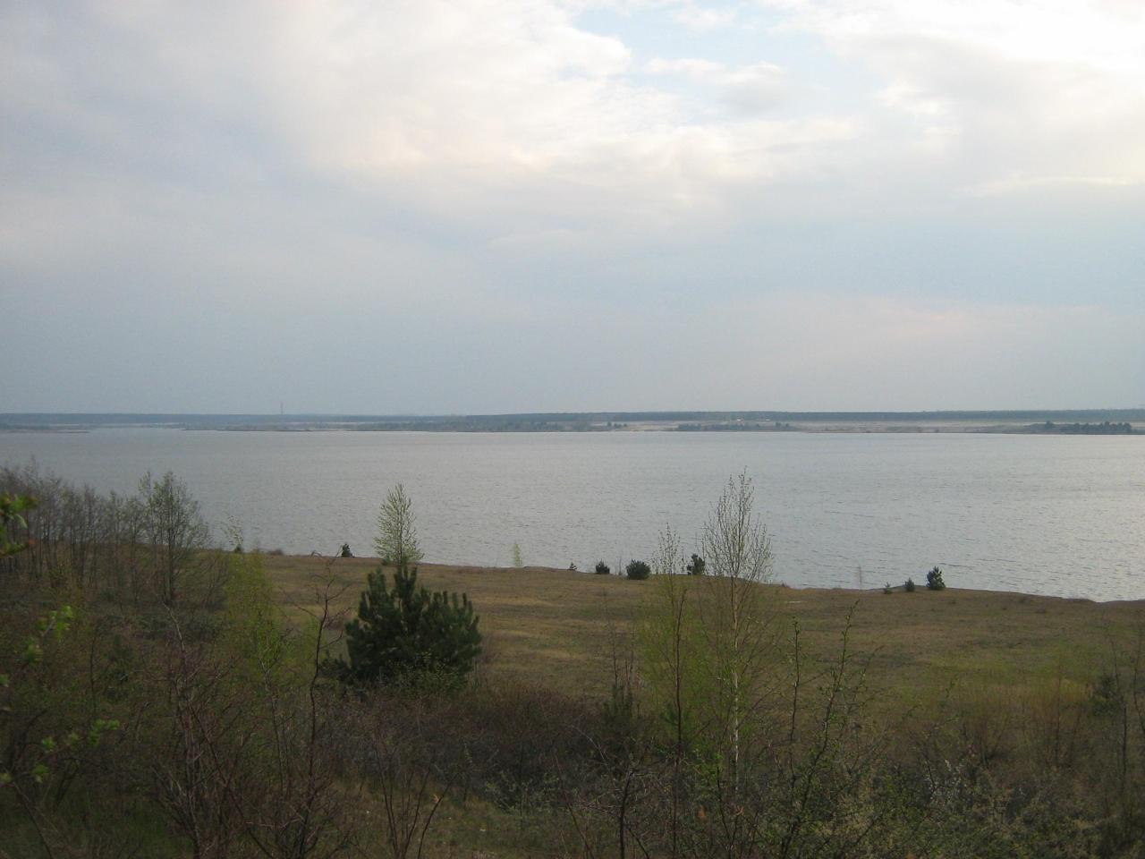 Der "Sedlitzer See" in Brandenburg. Hornjoserbsce: Sedličanski jězor w Braniborskej